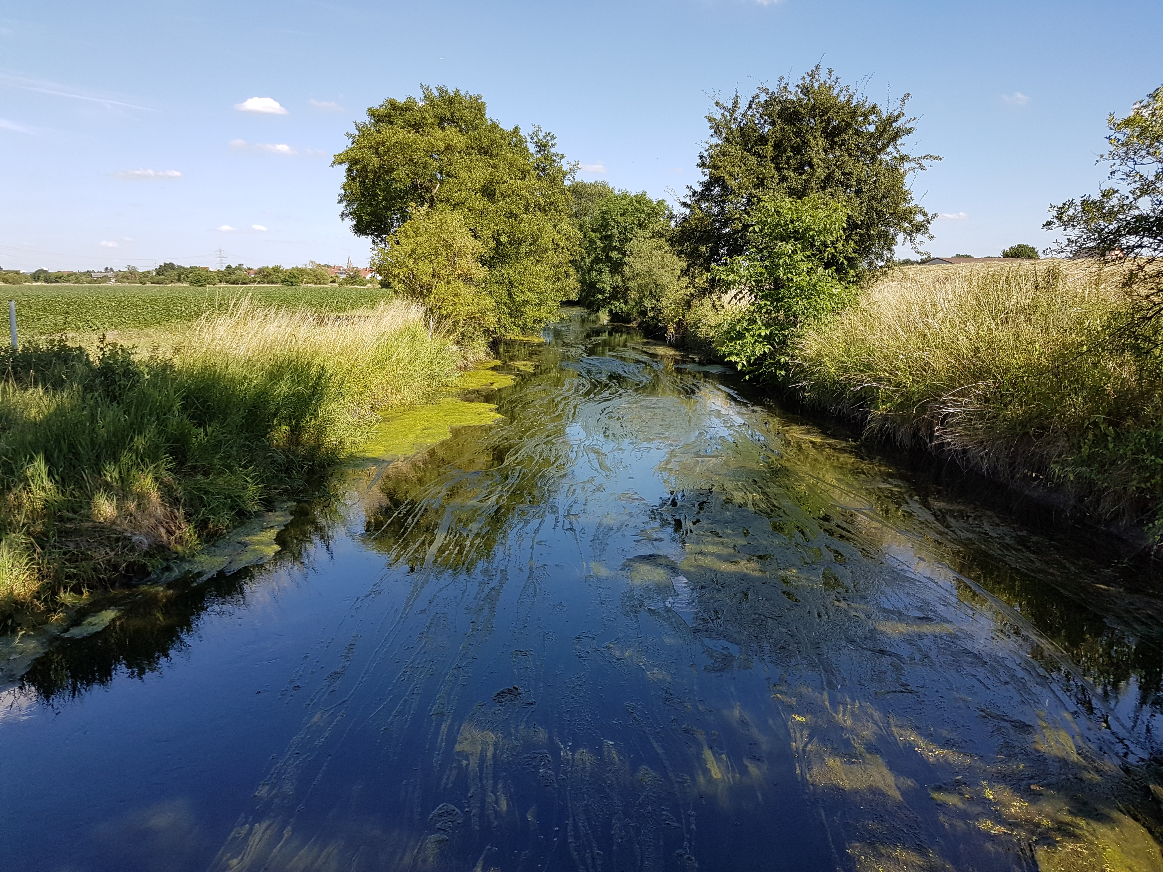 Der Landgarben westlich von Wallerstädten